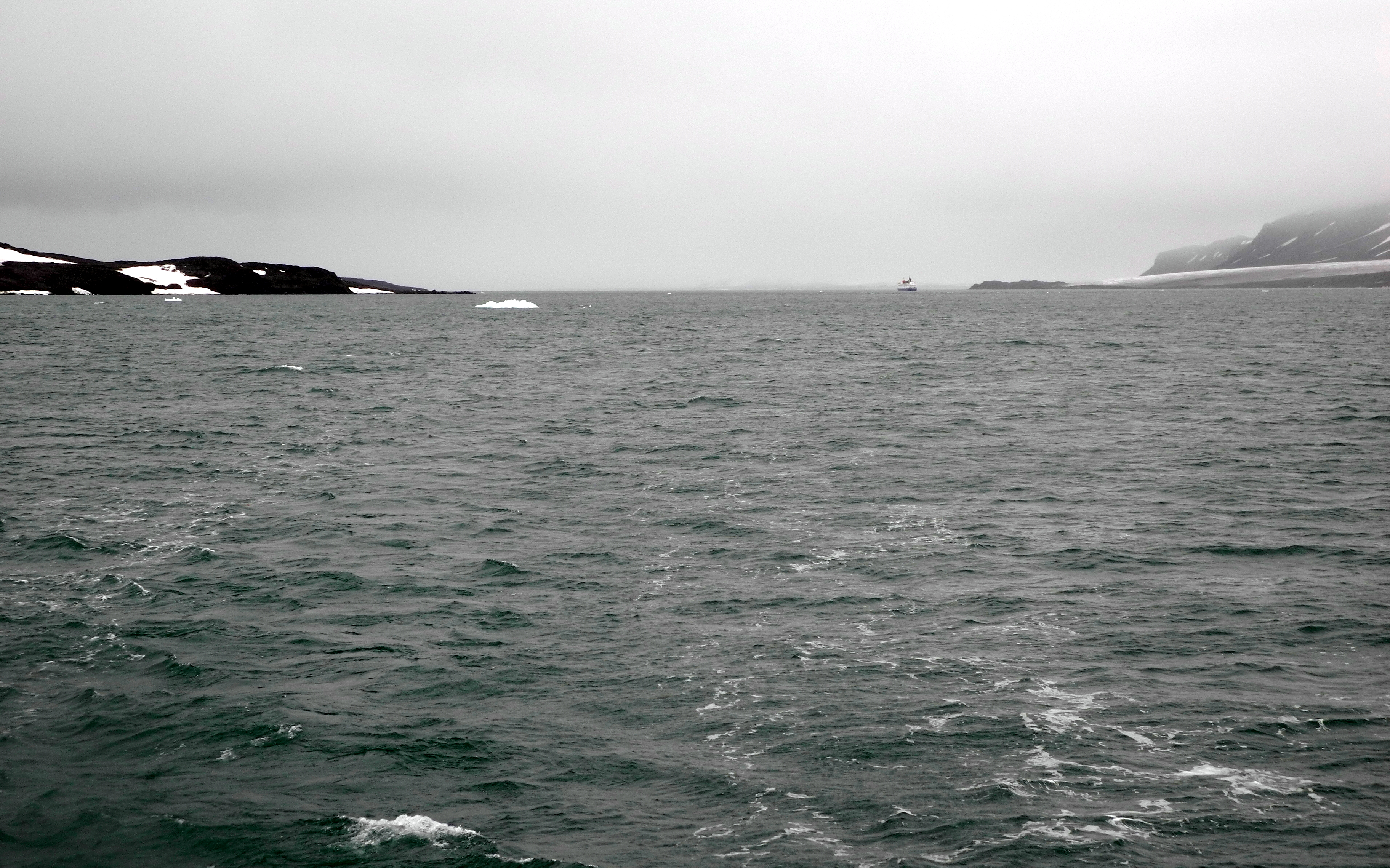 Bjørnsundet, a sound between Olav V Land (left) en Wilhelmøya (right).